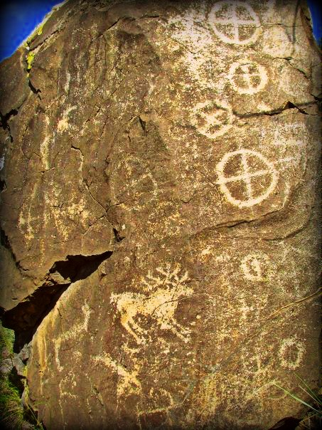 Бага-Заря - крупнейшая писаница в Забайкалье. Зарубино, Джидинский район, Бурятия.